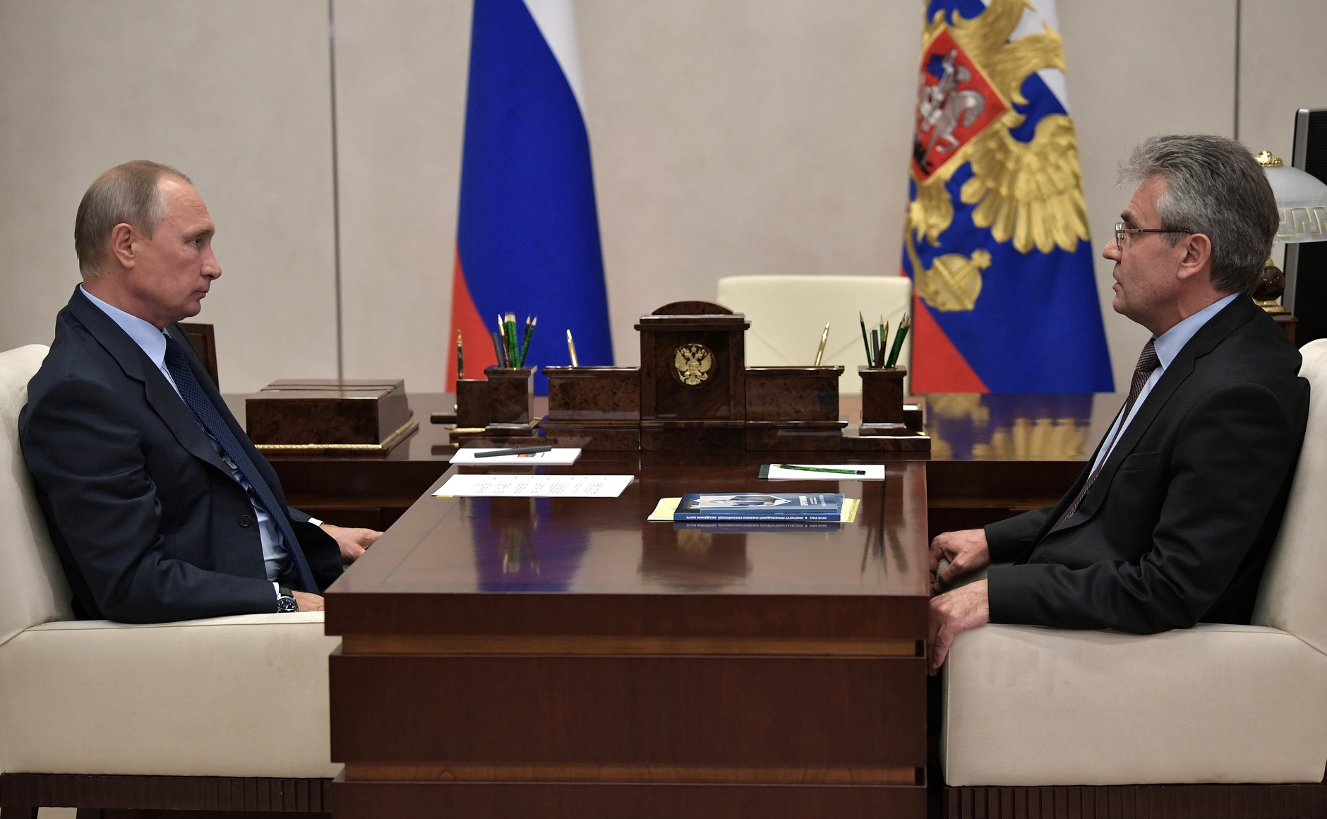 Встреча Президента России Владимира Путина с избранным президентом Российской академии наук Александром Сергеевым